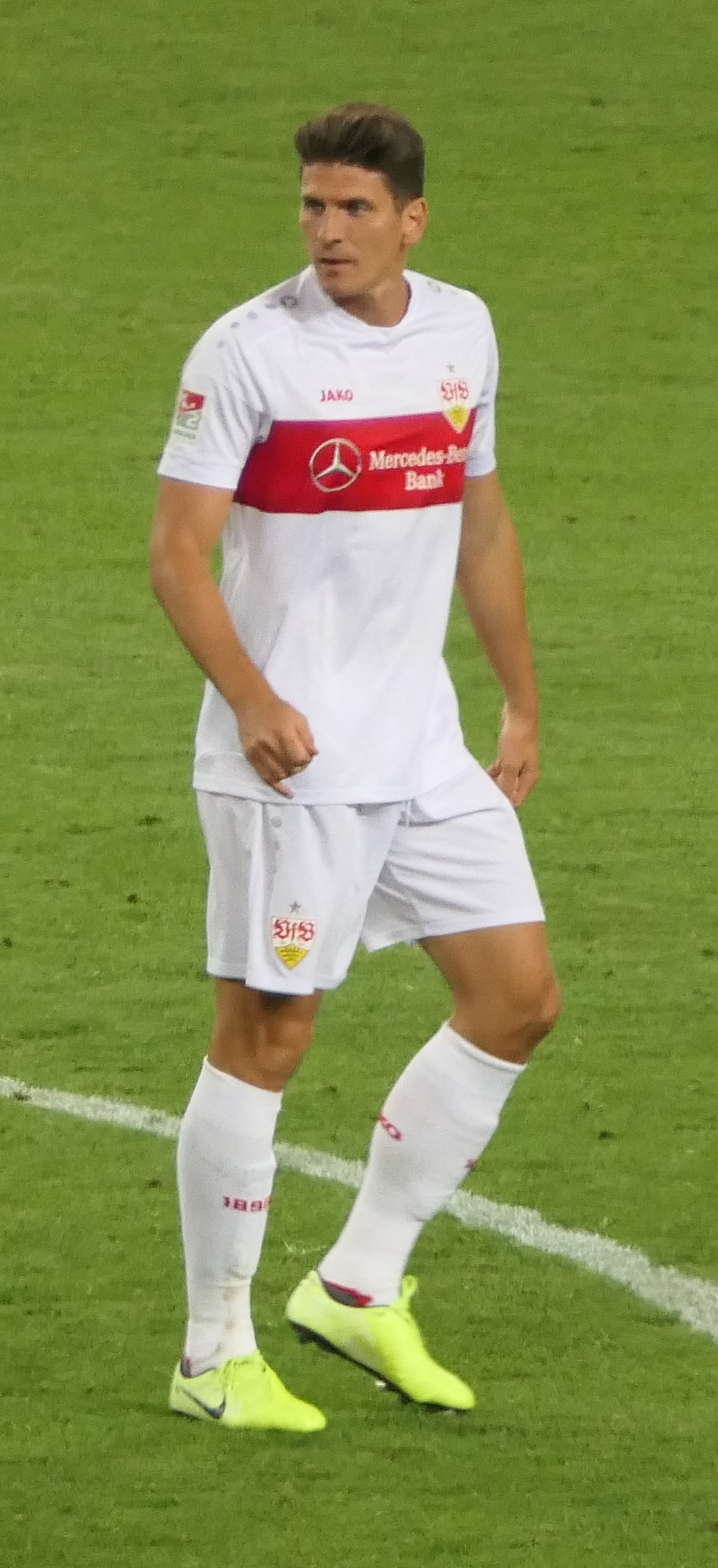 Der Fussballprofi Mario Gómez im Trikot vom VfB Stuttgart beim Heimspiel gegen den VfL Bochum am 02.09.2019.